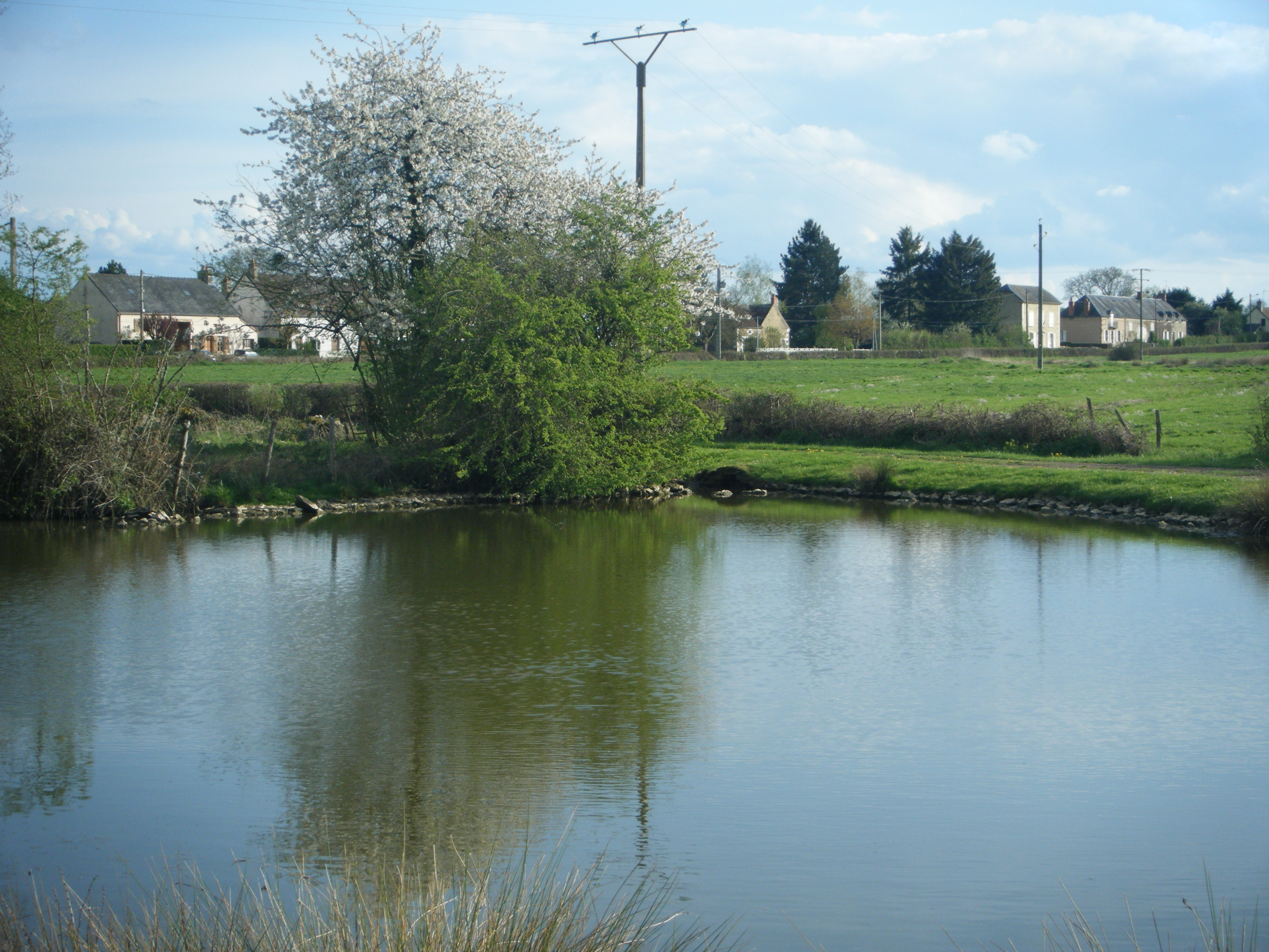 Mare de Champlin